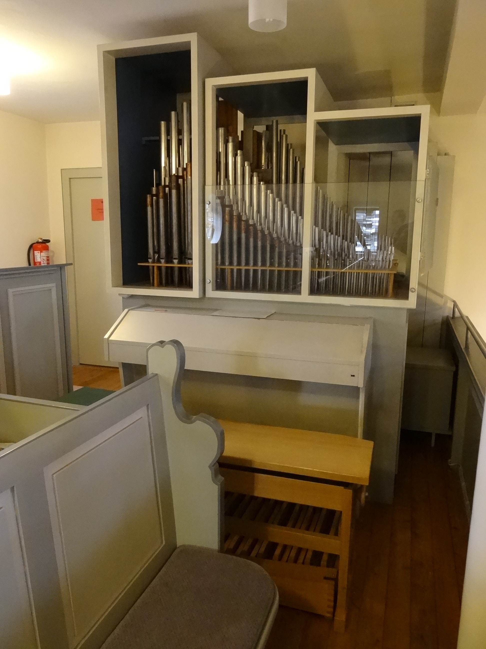 Evangelische Kirche Hausen (Pohlheim)